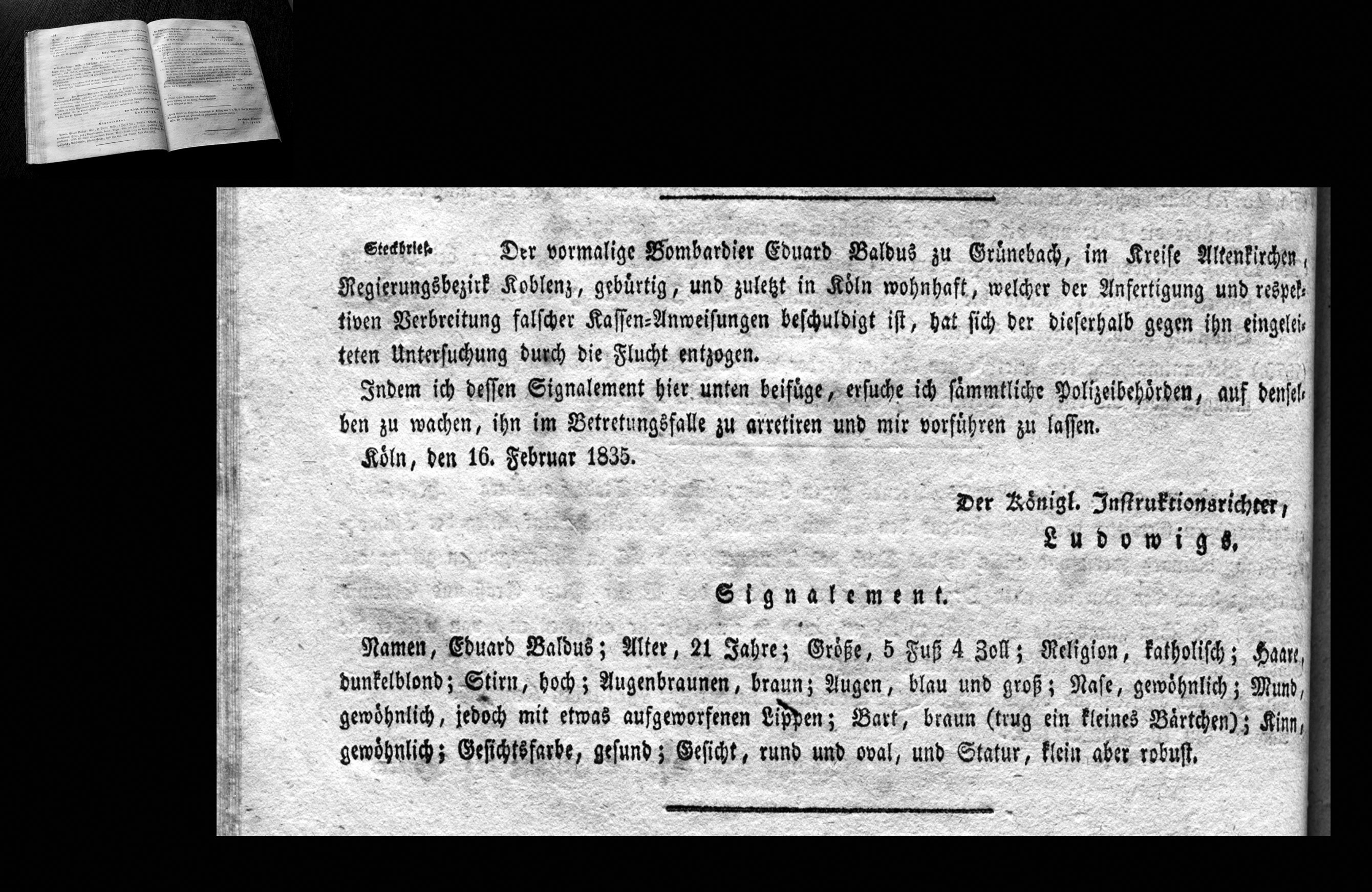 Steckbrief Eduard Baldus im Amtsblatt der Regierung zu Aachen, vom Donnerstag, den 26.Februar 1835 (Stück 11)